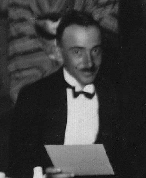 Josef Švagrovský, český právník, legionář a diplomat. Fotografie z večírku pro Československou ambasádu v Tokiu.